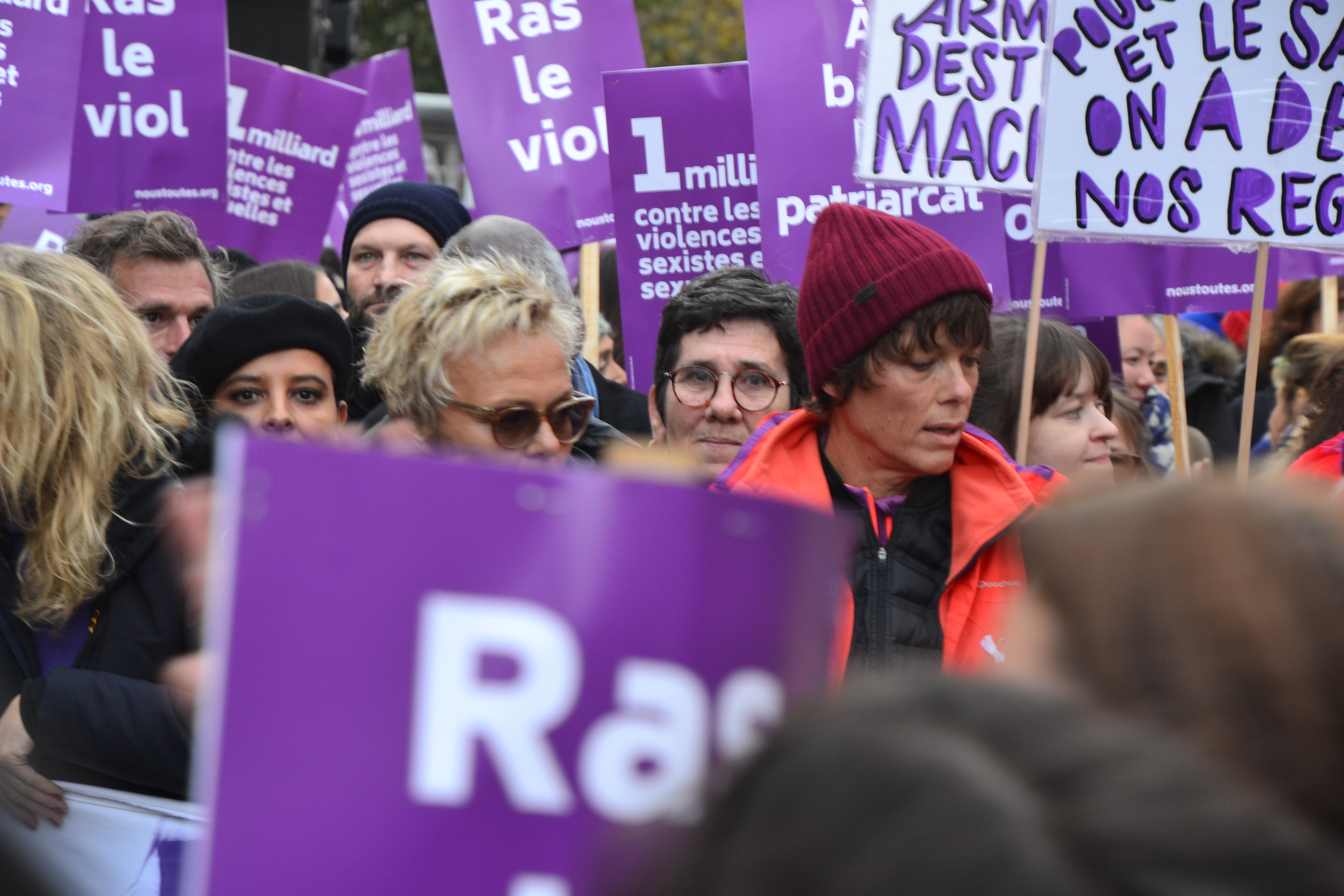 Muriel Robin. Crédit photo : Christine Garbage Une énorme mobilisation. Entre 50.000 et 100.000 personnes à Paris pour ce 23 novembre 2019 March against sexist violences and sexual violence. A huge mobilization. Between 50,000 and 100,000 people in Paris - 23 November 2019